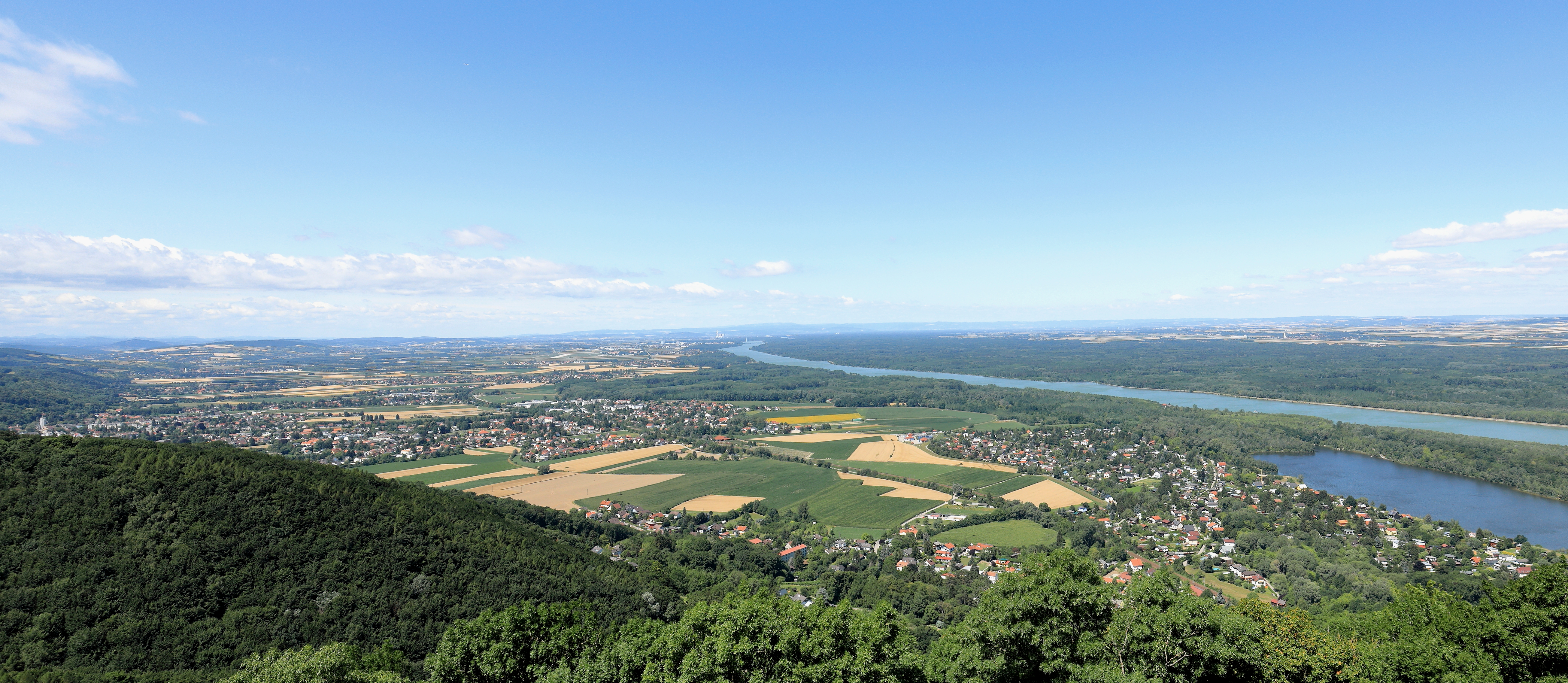 Blick von der Tempelbergwarte Richtung Westen über das Tullnerfeld. Im Vordergrund rechts Altenberg, links St. Andrä vor dem Hagenthale und in der Bildmitte Wördern, jeweils Ortsteile der niederösterreichischen Marktgemeinde St. Andrä-Wördern. Hinter Wördern Zeiselmauer-Wolfpassing und ganz hinten Bildmitte Tulln an der Donau sowie das Kraftwerk Dürnrohr.